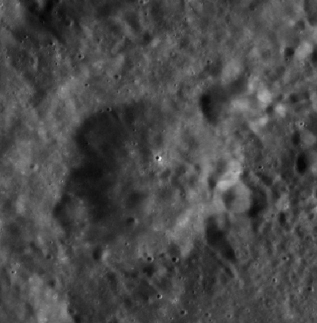 Cráter lunar Fesenkov. (Imagen LRO)